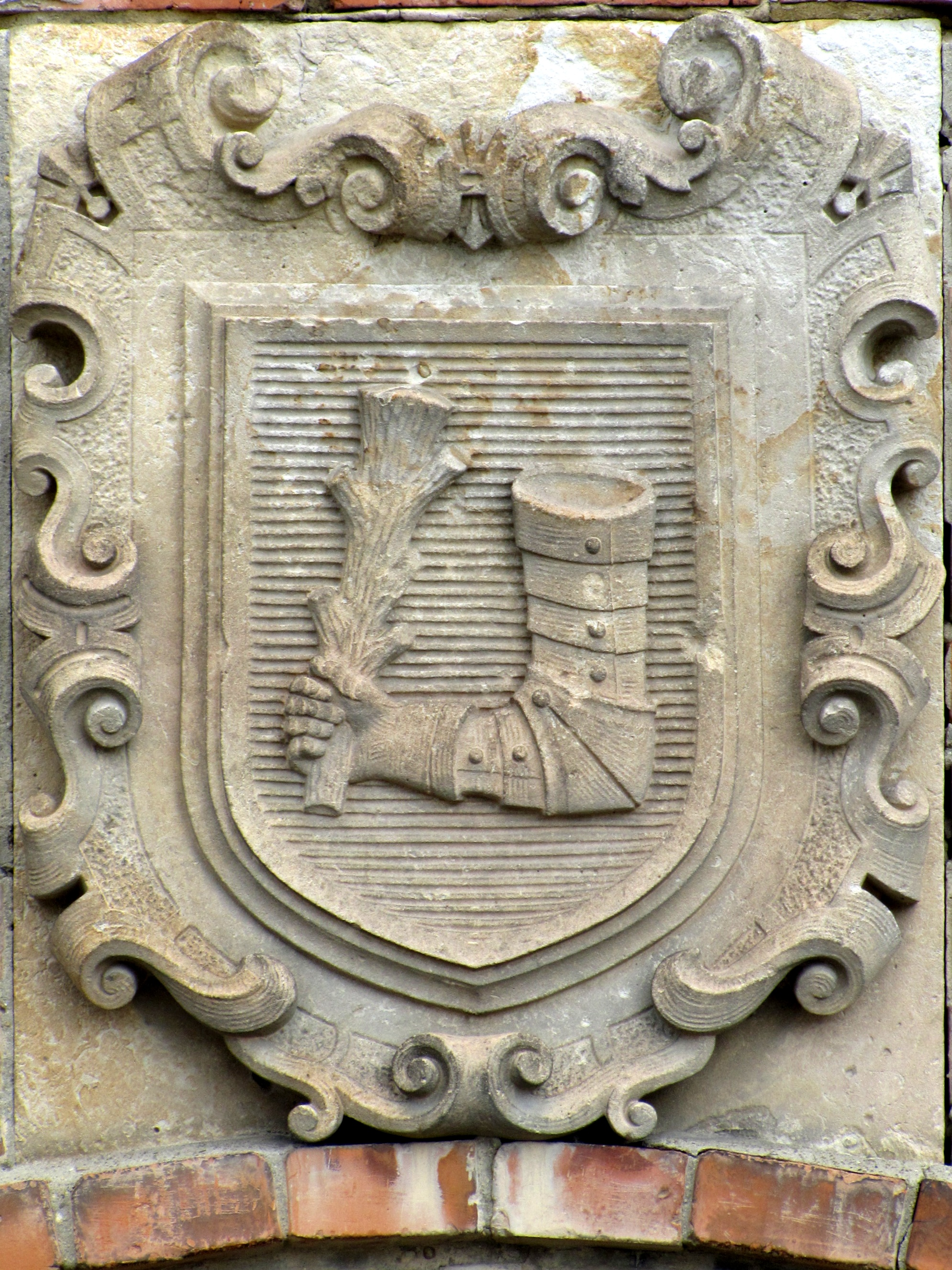 Znak města Kyjova nad vchodem domu č. 385 v Riegrově ulici